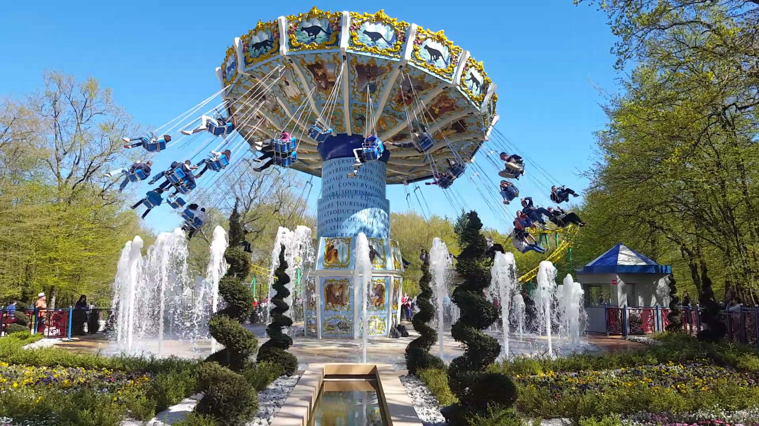 Les Chaises volantes nouveauté 2016 du Pal